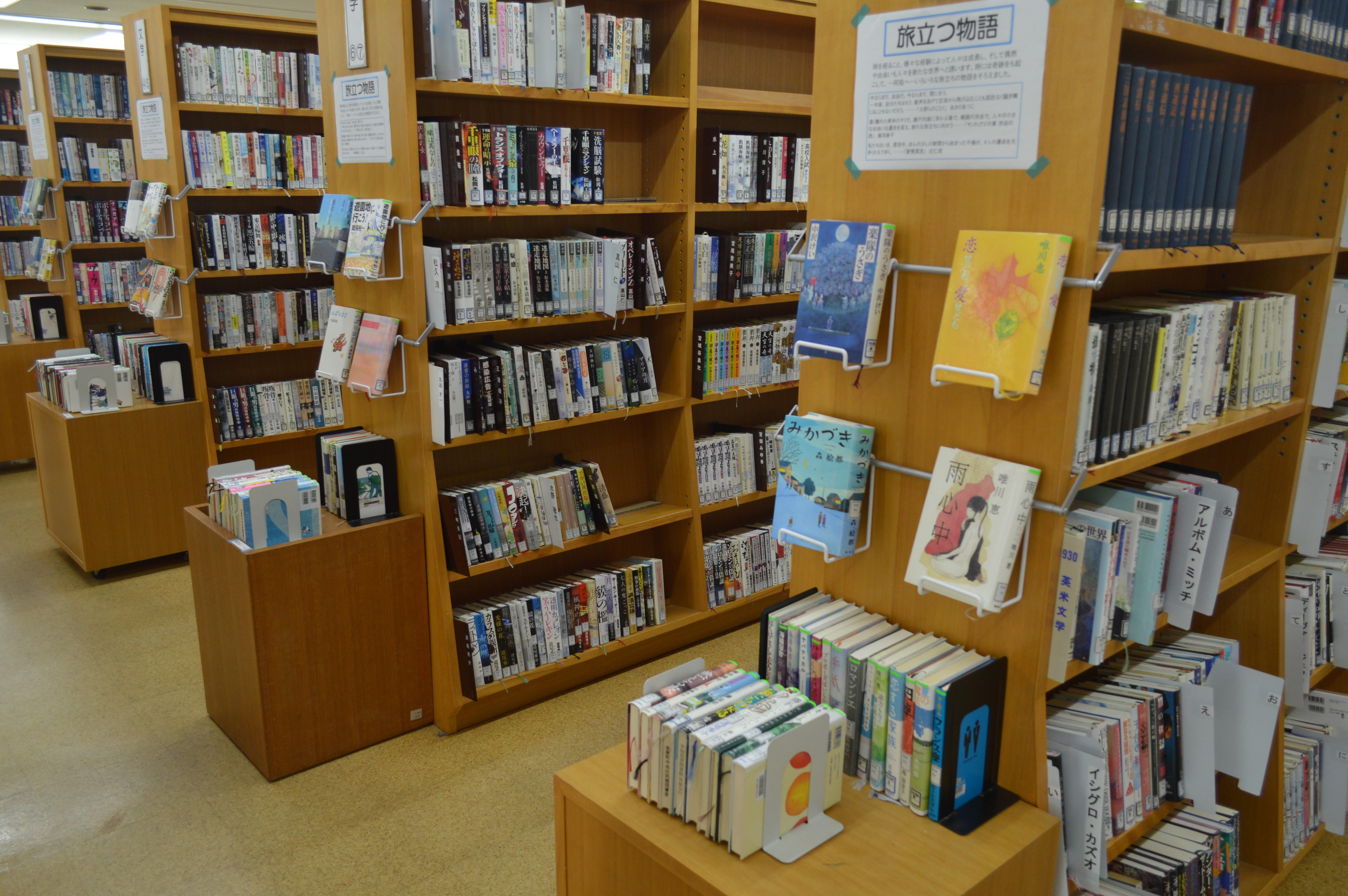 岐阜県多治見市の笠原中央公民館にある多治見市図書館分館。